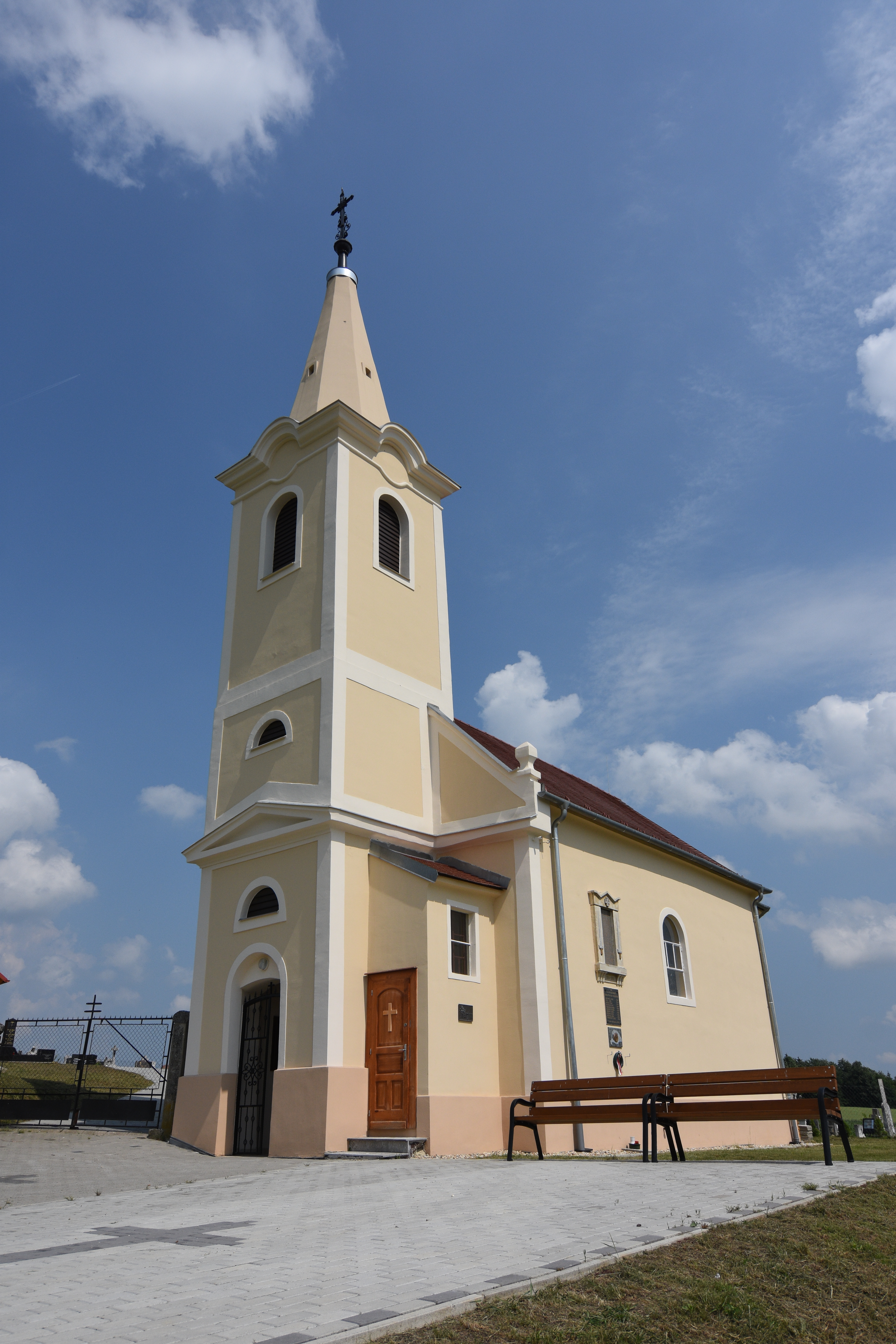 Saint Martin Church in Ólmod